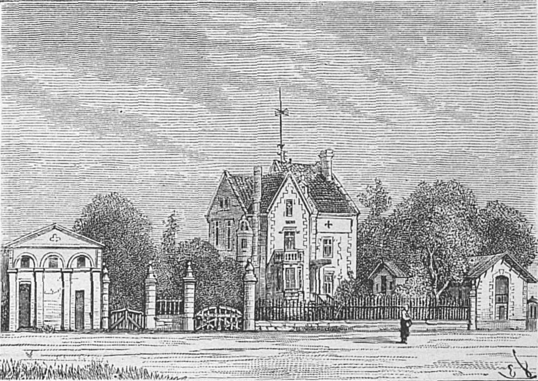 Illustration du Château Mouton Rothschild dans l'ouvrage Bordeaux et ses vins (6ème édition) de Charles Cocks et Edouard Féret publié en 1893